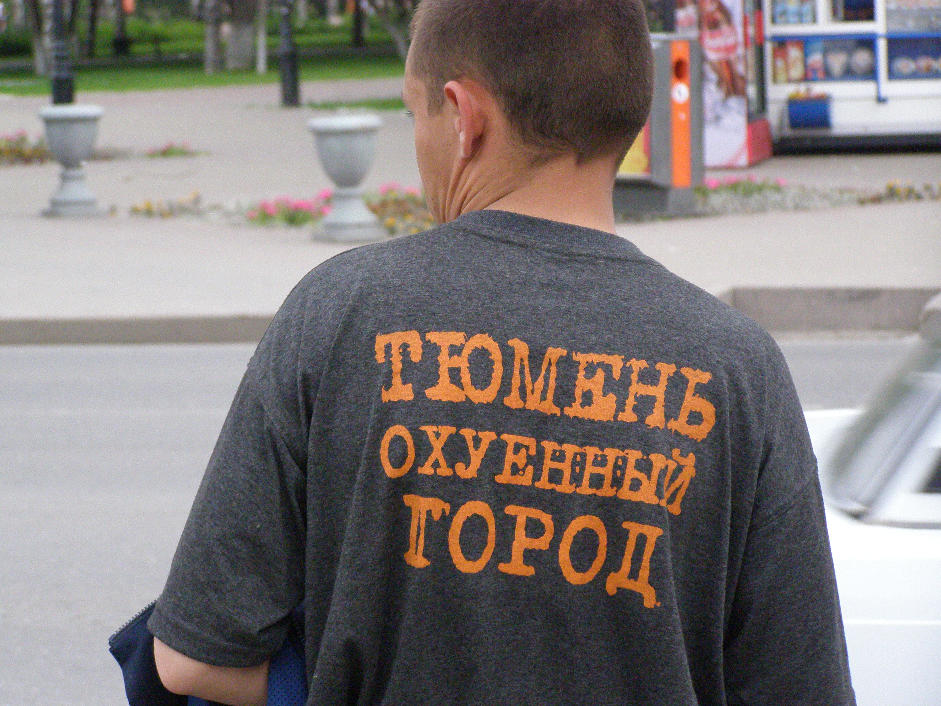 Viro en T-ĉemizo kun surskribo en la rusa: "Tjumeno estas kace mojosa urbo" ĉe angulo de stratoj Respubliki kaj Ĥolodilnaja. Tjumeno, Rusio.